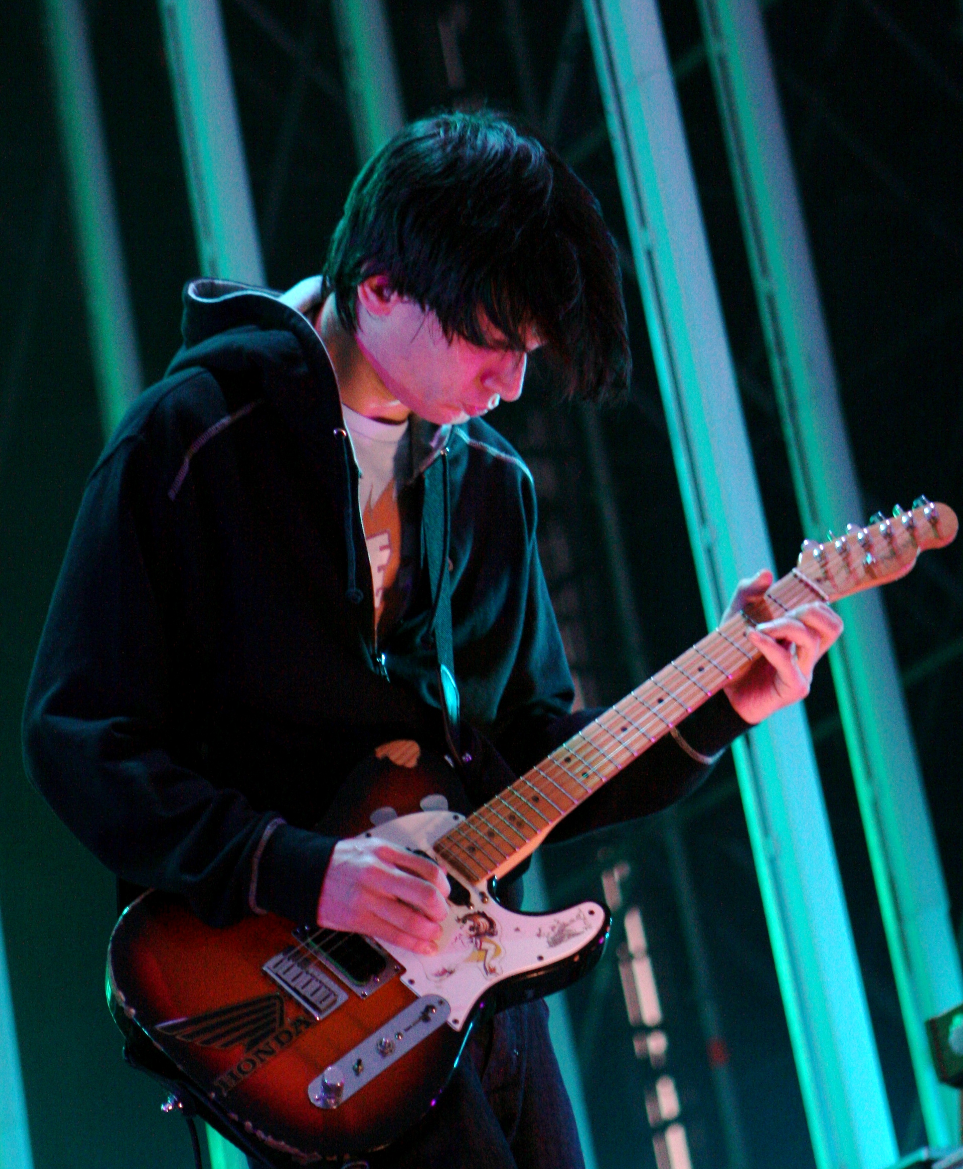 Radiohead en el Daydream Festival que se celebró en Barcelona el 12 de Junio de 2008. Podéis encontrar más información de este y otros eventos en nuestra web